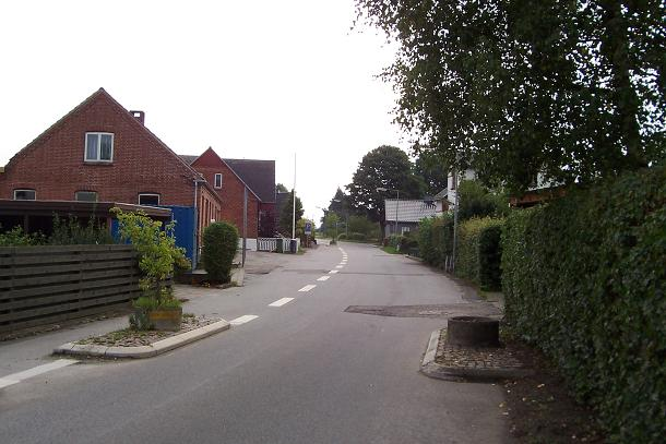 Gl. Virringvej (Gram, Skanderborg Kommune) set mod øst.